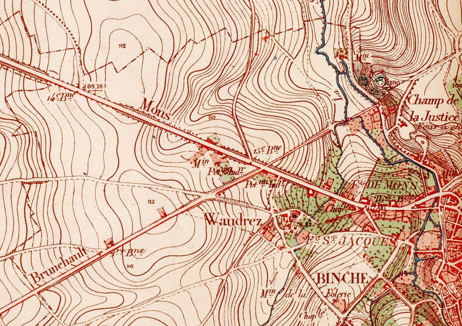 Extrait d’une ancienne carte dite « d’État-Major »